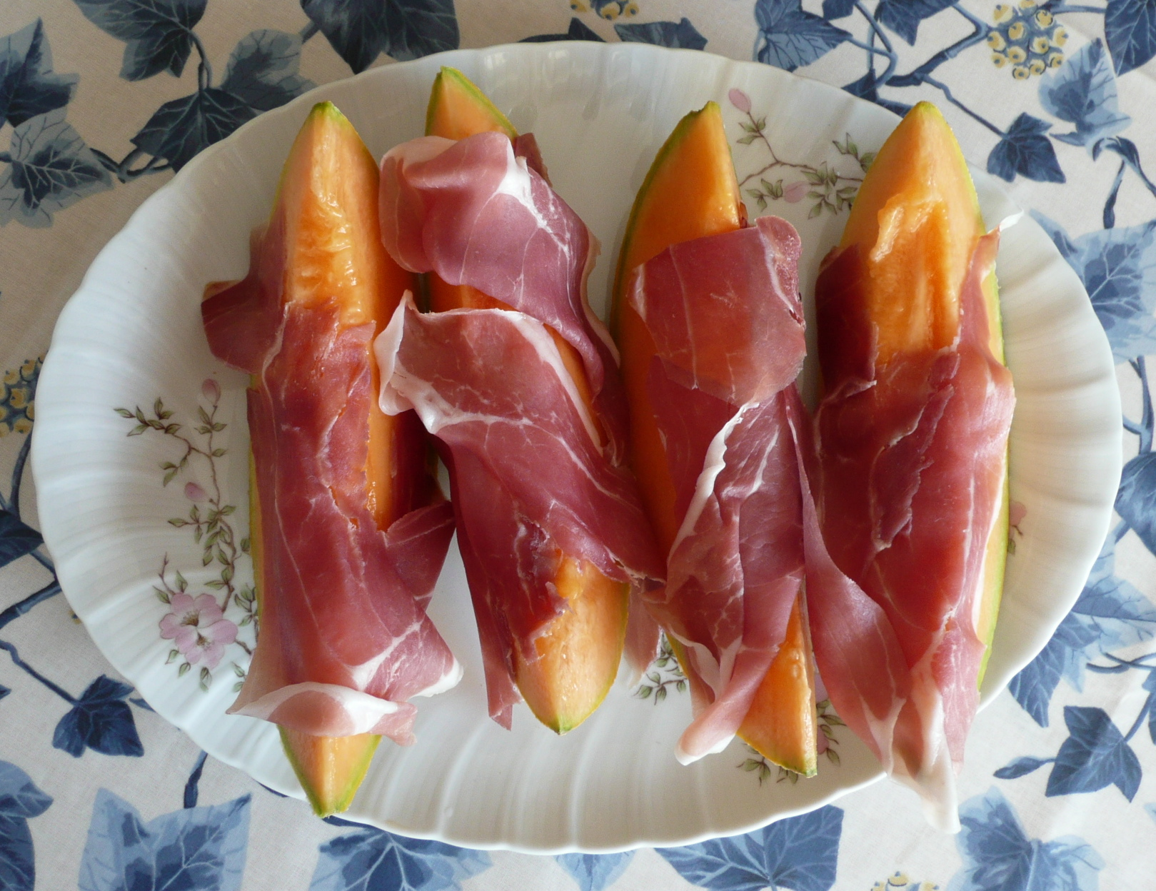 Prosciutto di Parma e melone, un tipico piatto estivo parmigiano.